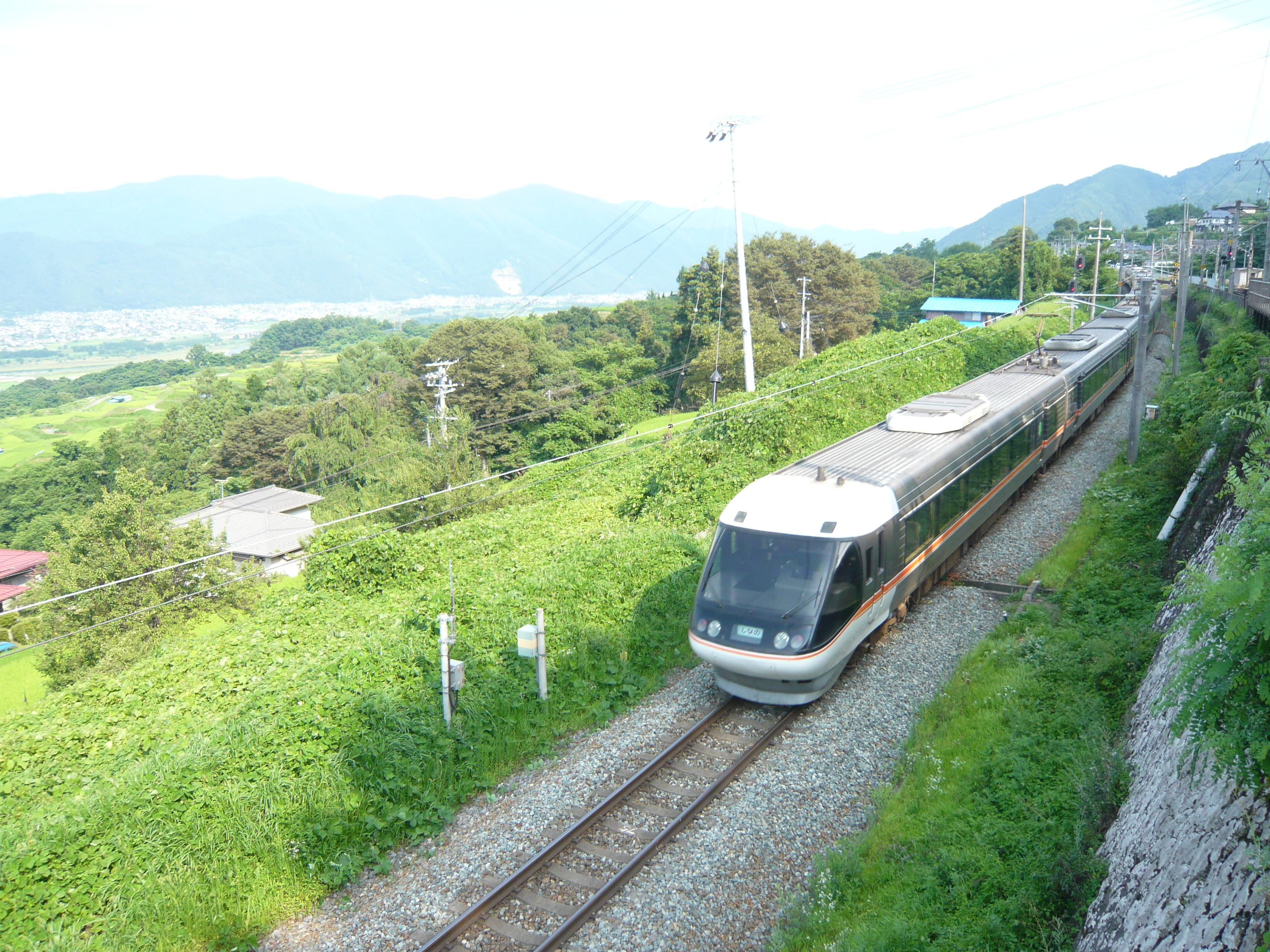 姨捨駅下通過時の写真です。